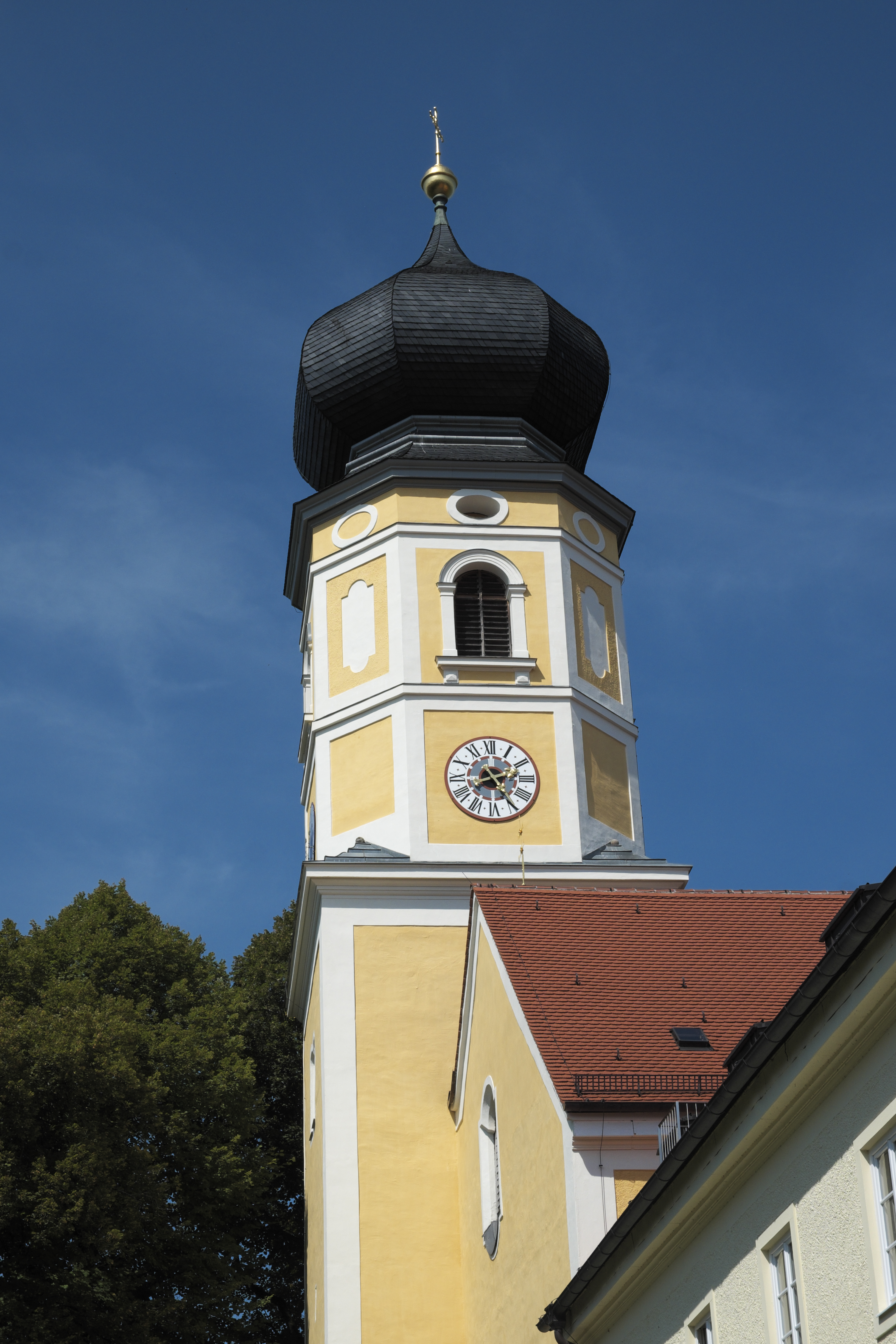 Katholische Pfarrkirche St. Martin, ehemalige Augustinerchorherrenstiftskirche, in Bernried am Starnberger See im Landkreis Weilheim-Schongau (Bayern/Deutschland)